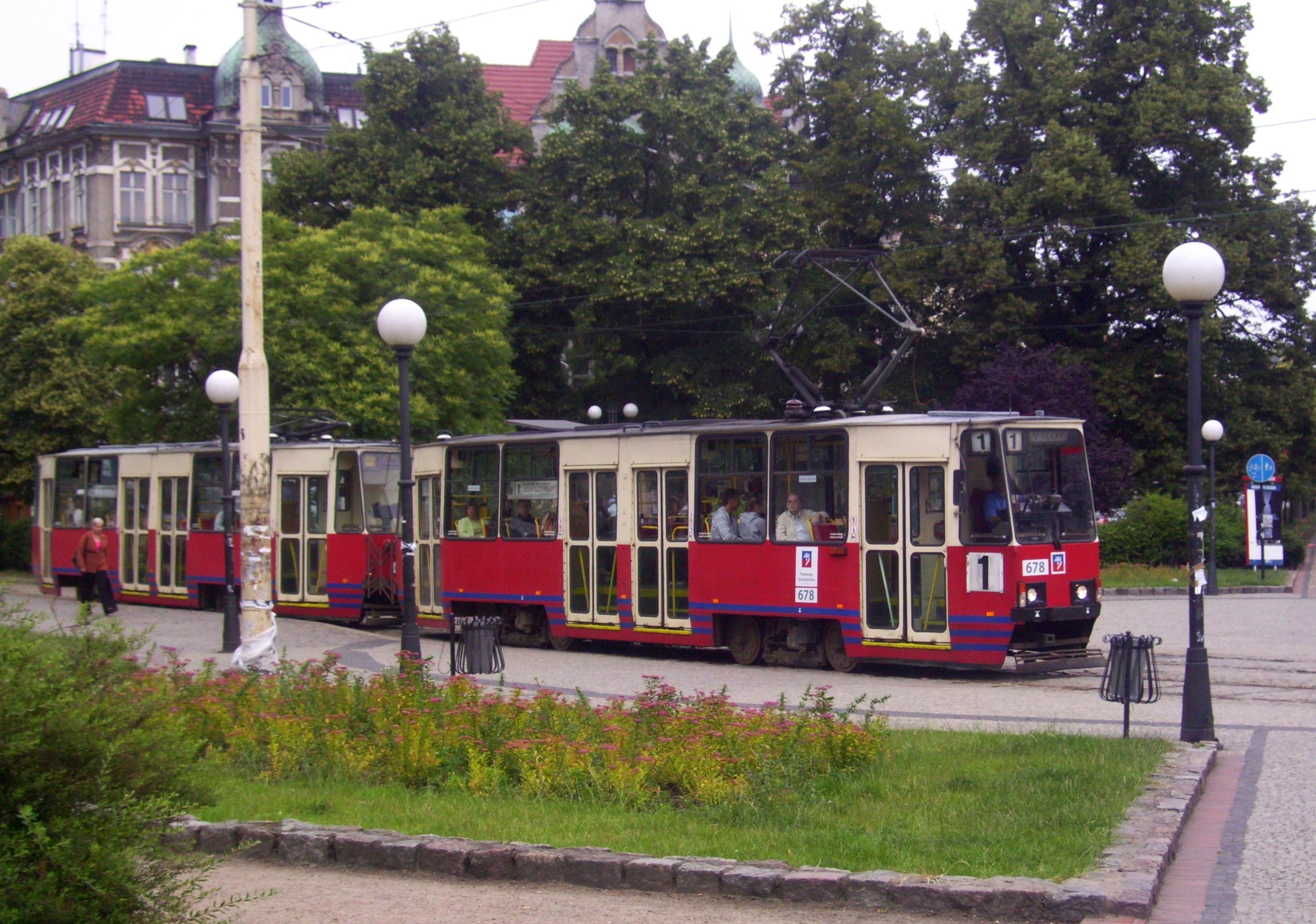 Linia tramwajowa nr.1 w SzczecinieSlovenščina: Tramvajska linija št. 1 v Ščečinu